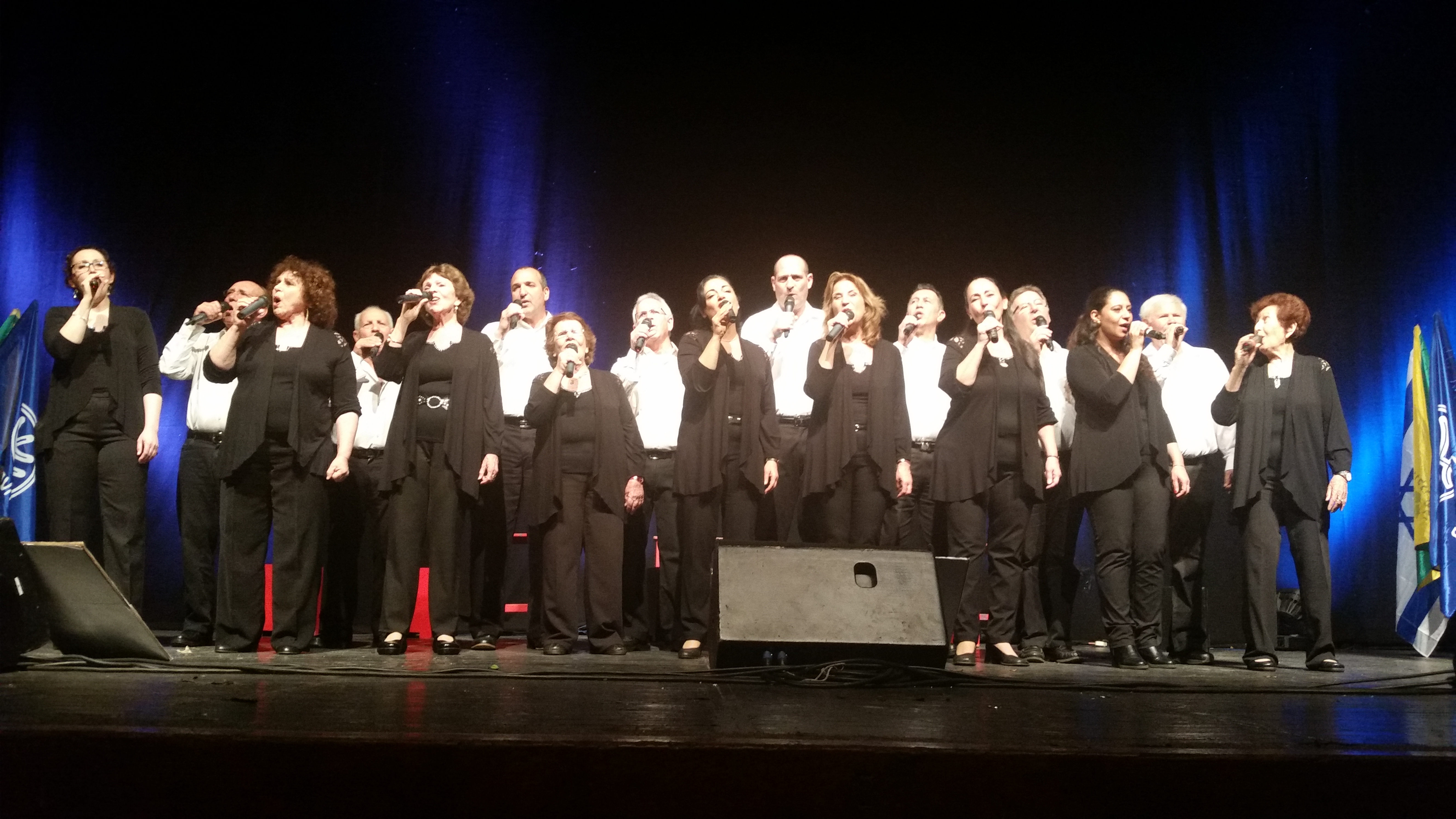 להקת גבעטרון במופע ביום העיון לזכרו של אמיר דרורי שהיה המייסד של רשות העתיקות